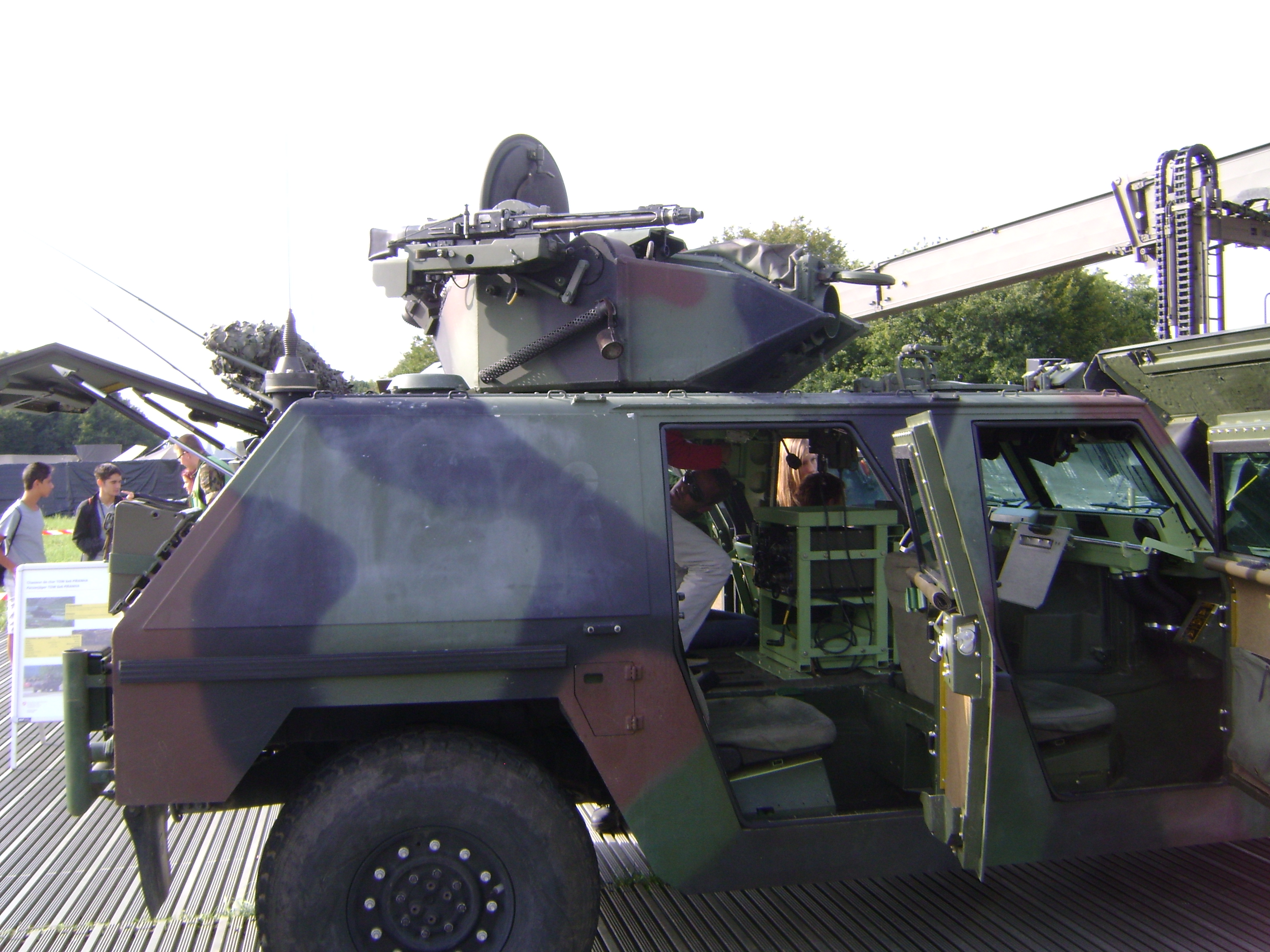 Véhicule d'exploration MOWAG Eagle II armé d'une mitrailleuse 51/71 7.5 mm